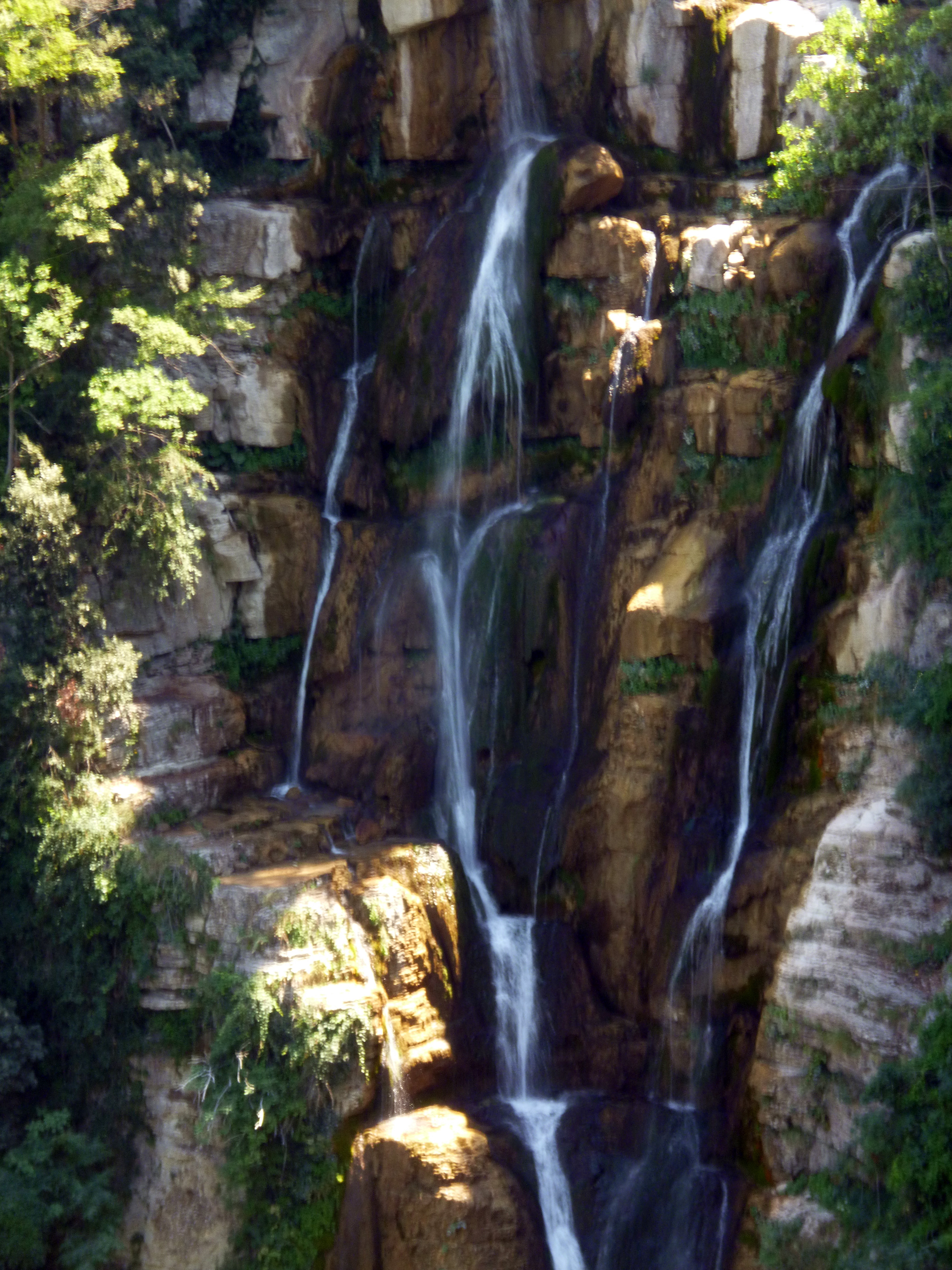 Cascate del Rio Verde This is a photo of a monument which is part of cultural heritage of Italy. The authorisation for taking photos of this object was provided by the World Wide Fund for Nature Italy.